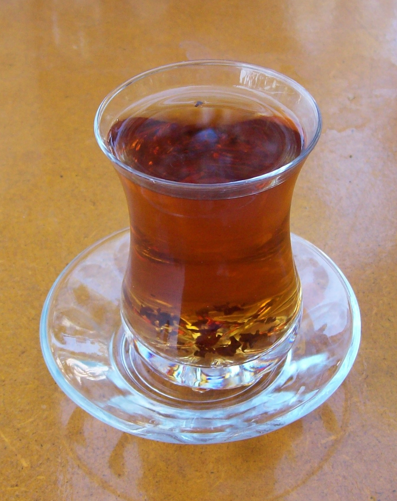 Чай в азербайджанском стаканчике Армуду (Баку, Азербайджан)